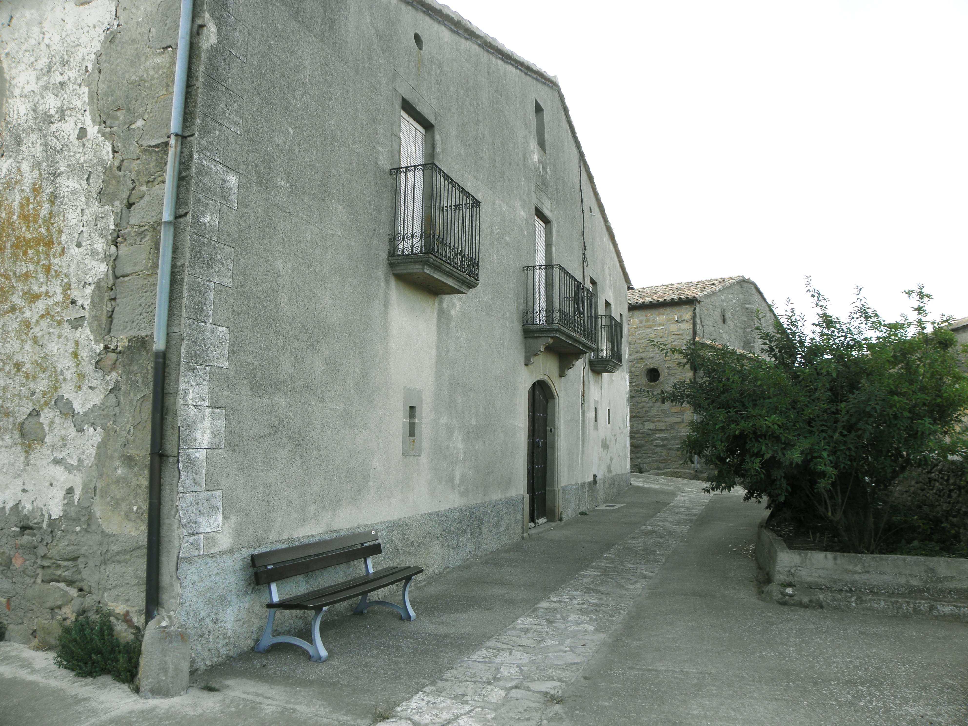 Carrer de Prades de la Molsosa (La Molsosa, Solsonès)Al fons, la cantonada del sud-est de l'església de Sant Ponç